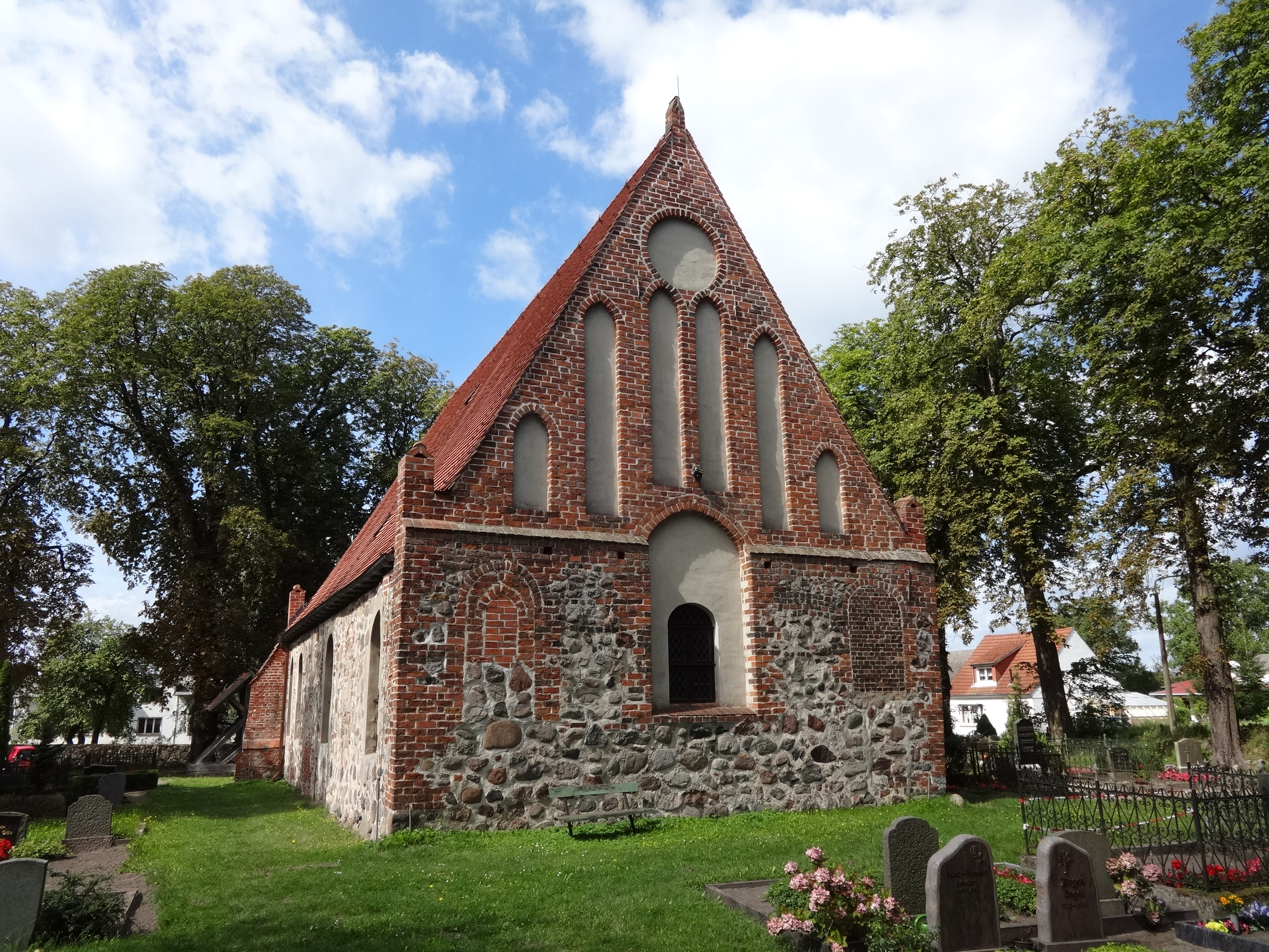 Feldsteinkirche in Garz (Usedom), vermutlich aus dem 13. Jahrhundert